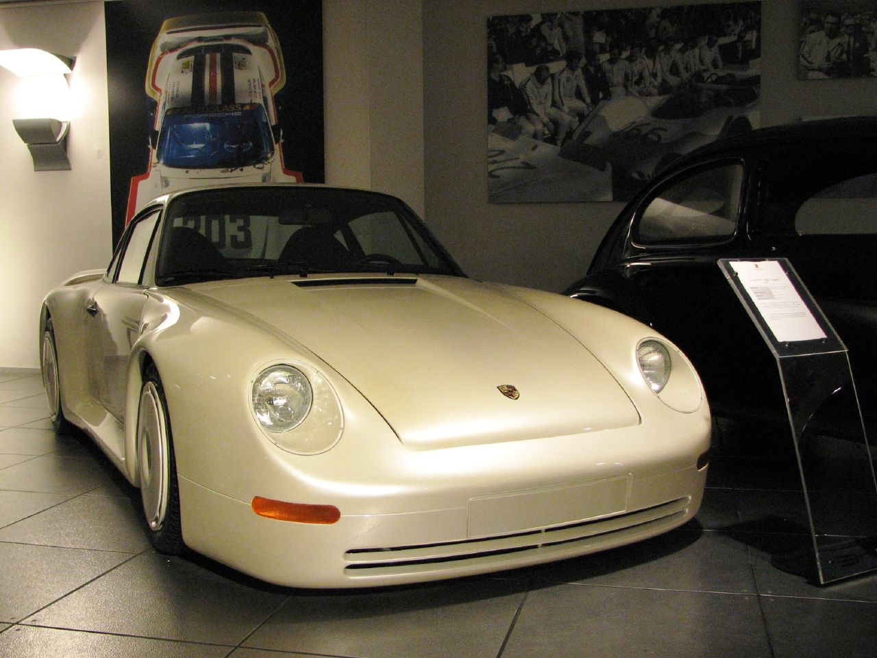 Porsche 959 Concept Car Gruppe B 1983stuttgart 124